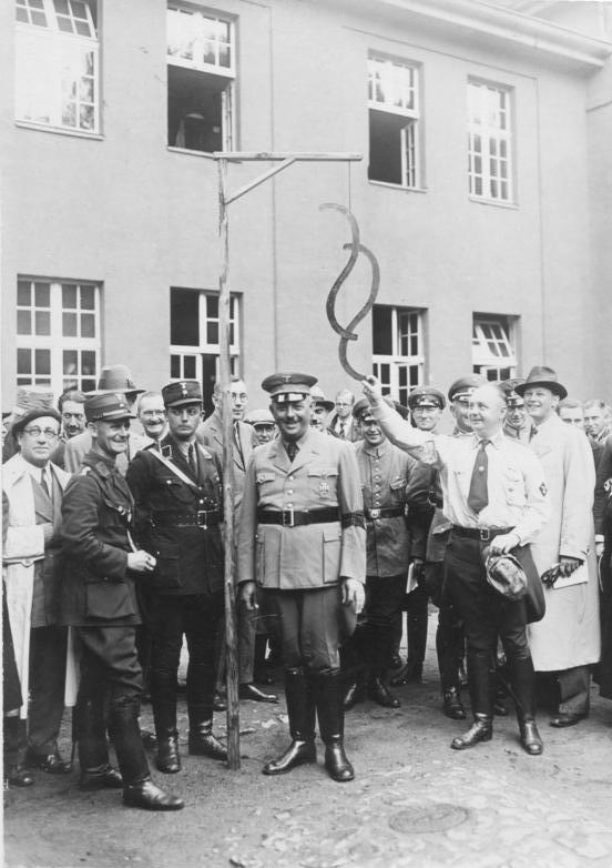 Der preußische Justizminister Kerrl besucht das Referendarlager in Jüterbog! Der preußische Justizminister Kerrl im Referendarlager bei der Besichtigung des Galgens mit dem darauf aufgehangenen Paragraphen. Links neben ihm der Lagerleiter Oberstaatsanwalt Spieler und Sturmführer Heesch.